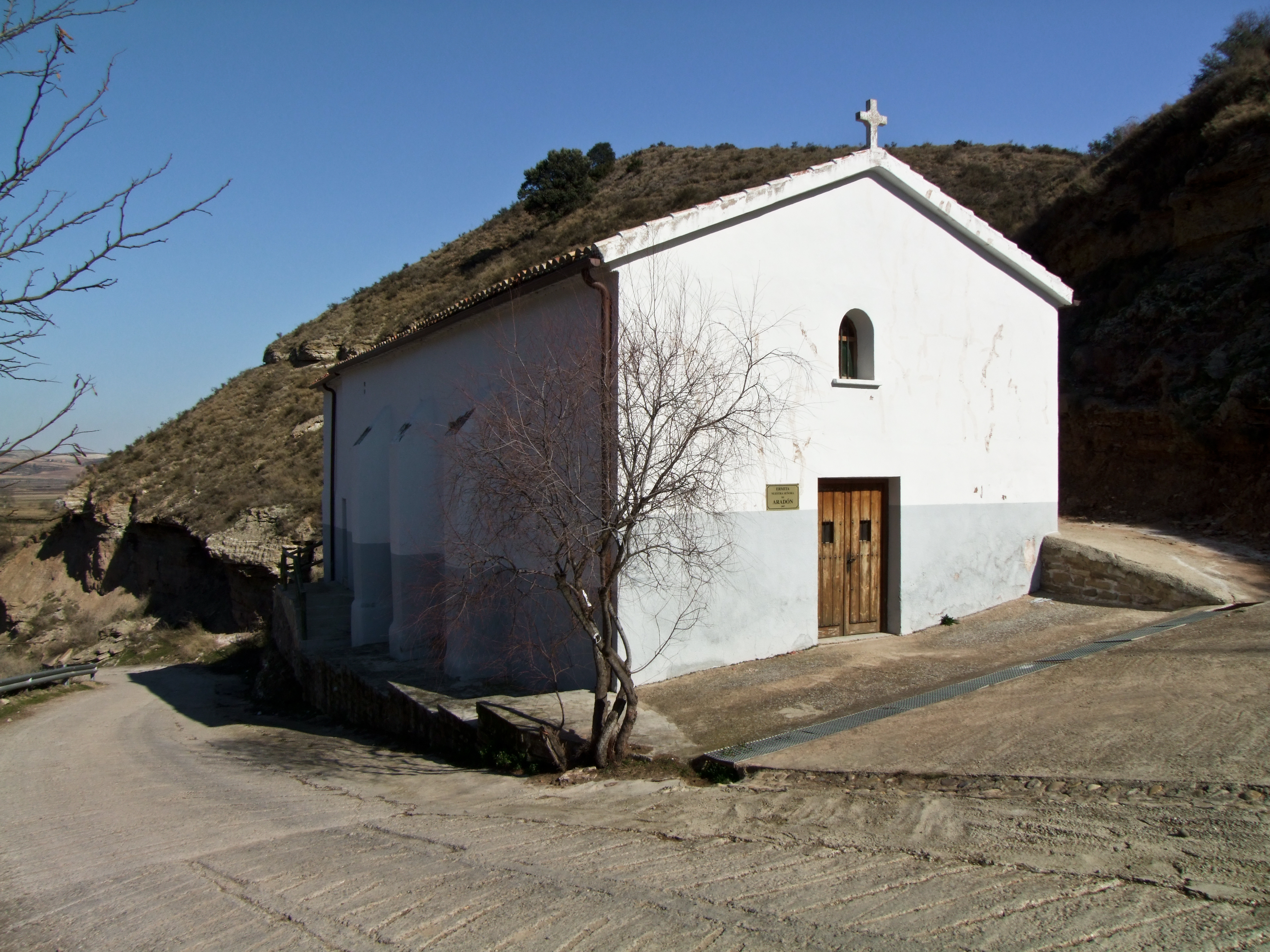 Ermita de Nuestra Señora de Aradón en la localidad de Alcanadre, La Rioja - España